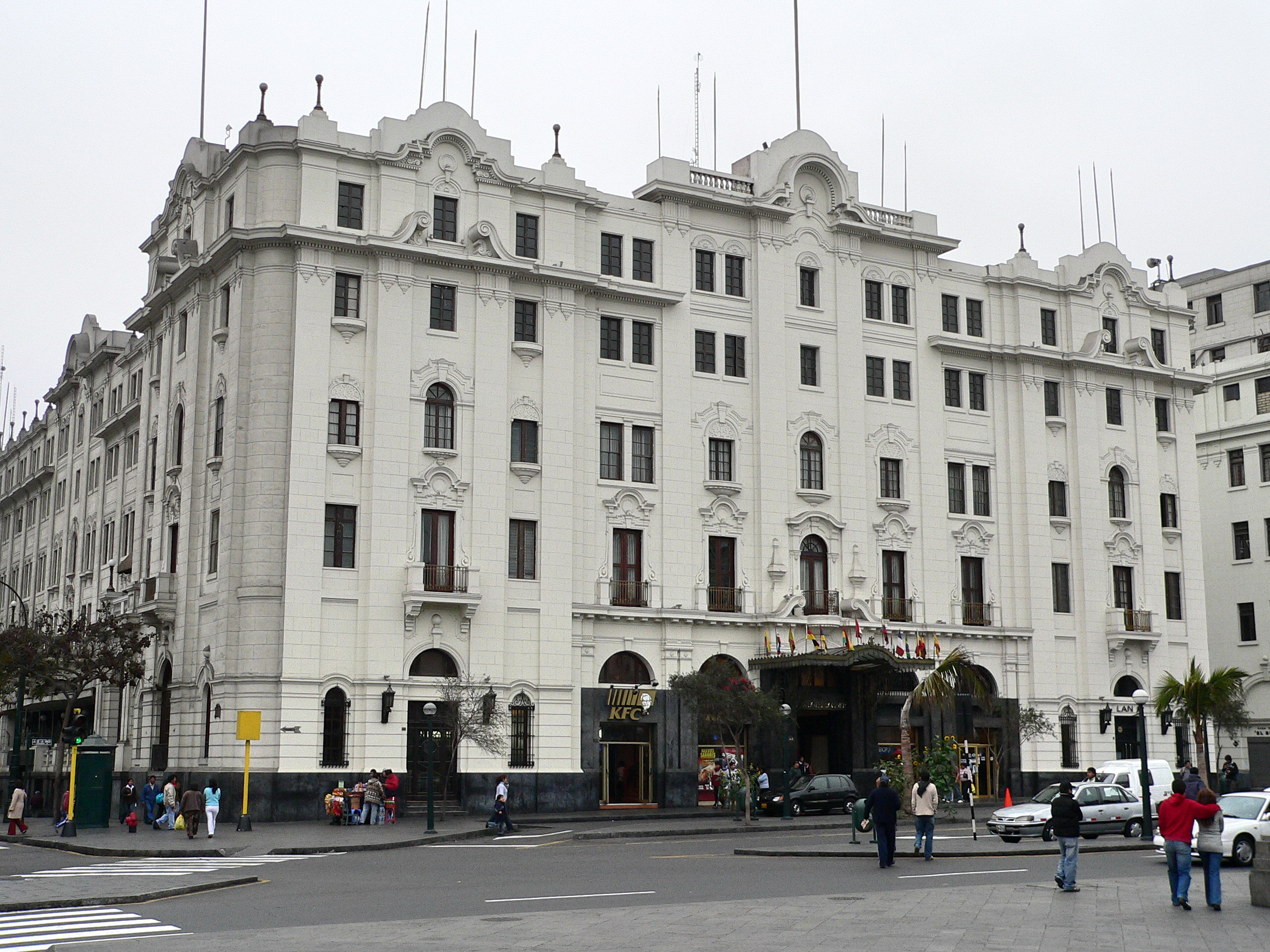 Descripción: Hotel Bolívar Lugar: Centro Histórico de Lima Distrito : Cercado de Lima Ciudad : Lima País : Perú Fotógrafo: © Manuel González Olaechea y Franco Fecha de la foto : 8 de julio de 2007